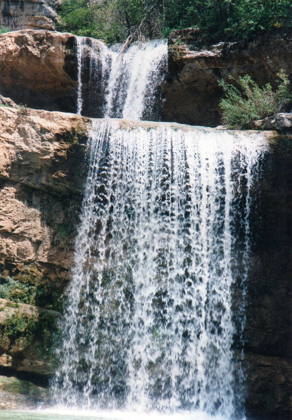 Ura e vjetër e gurit në Prizren